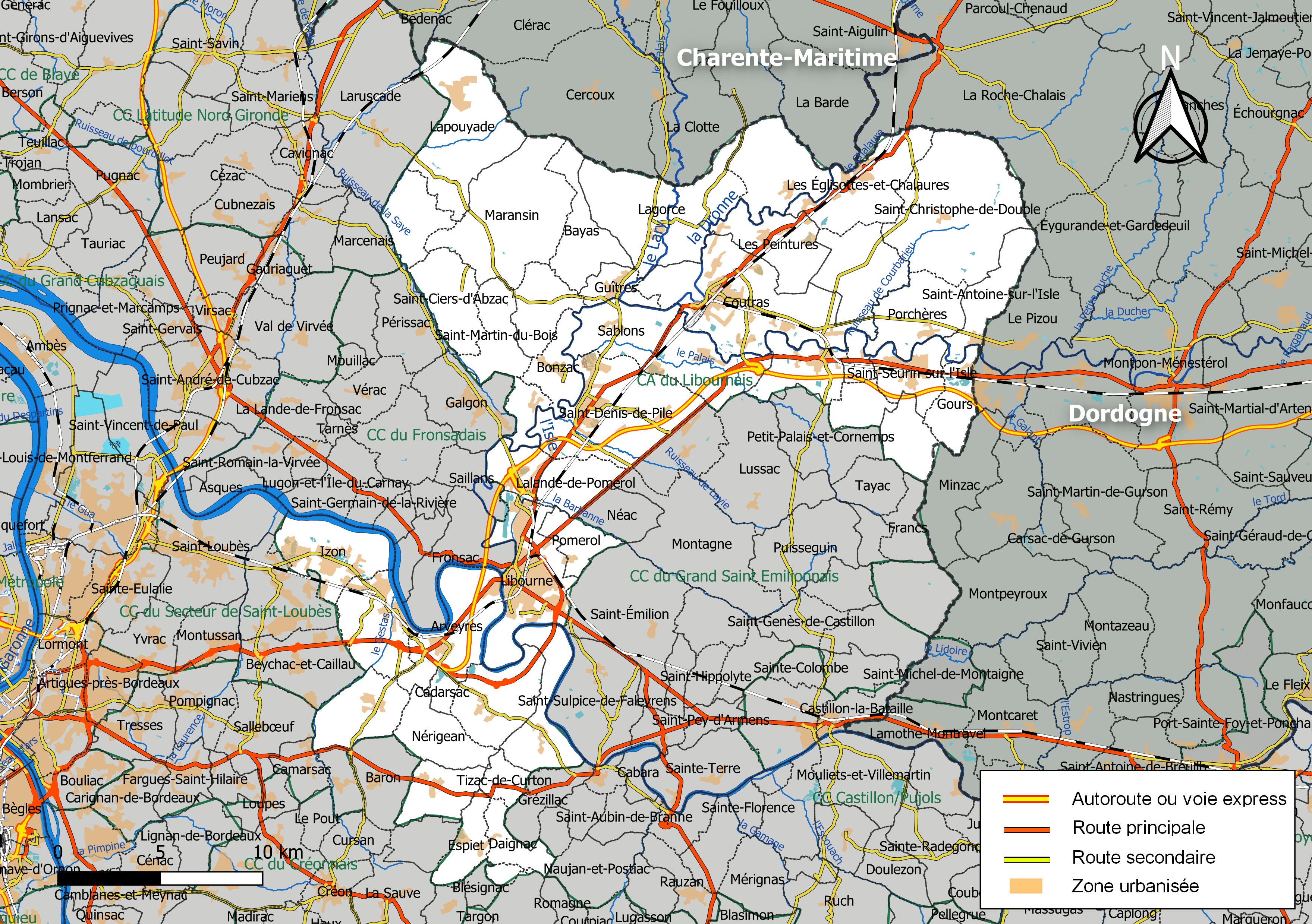 Carte géographique de la Communauté d'agglomération du Libournais, département de la Gironde, France. Composition au 1er janvier 2019.